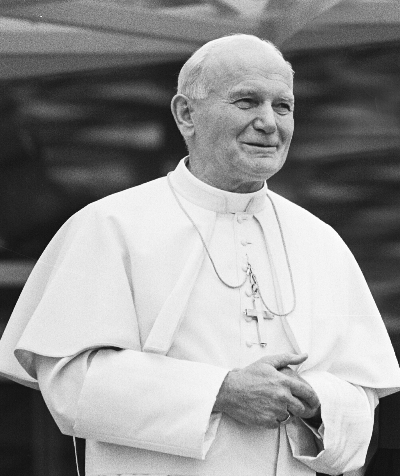 Jan Paweł II podczas wizyty w Holandii w 1985 roku